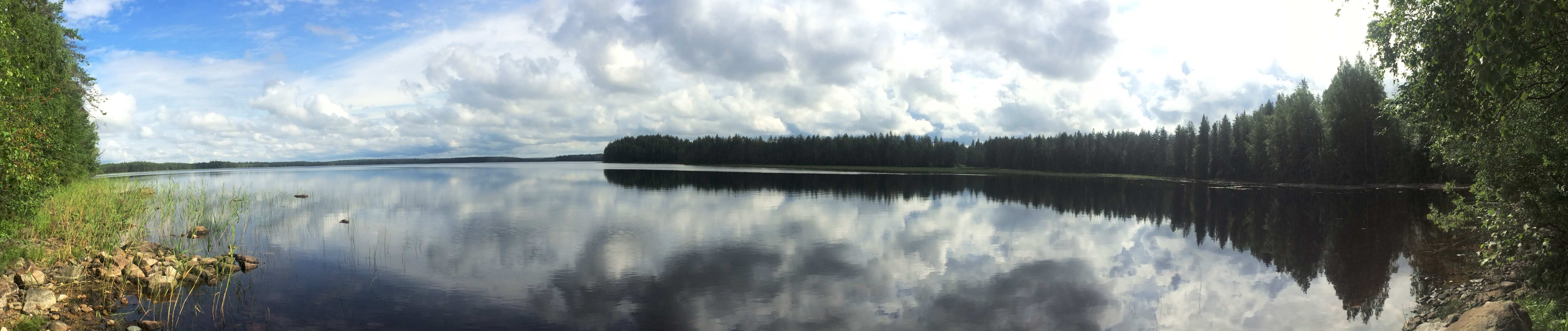 Виексинкиярви